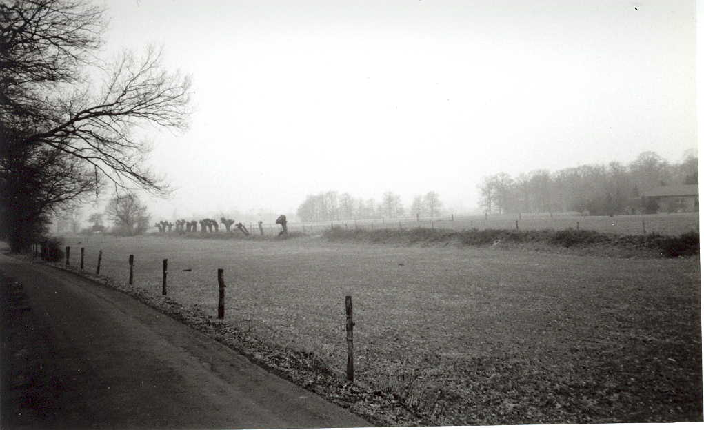 Ein gut erkennbarer Teil der ehemaligen Fossa Eugeniana, eigenes Bild, GNU FDL